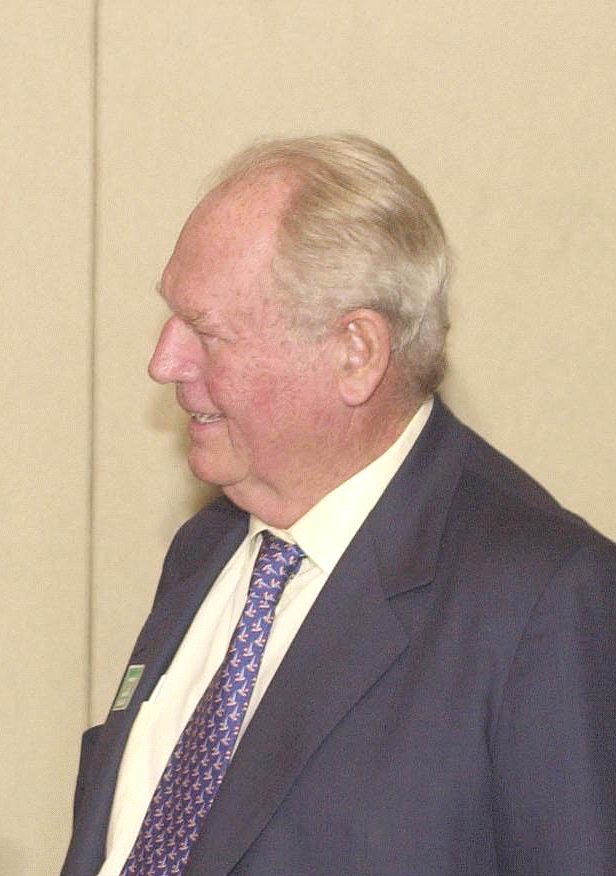 O empresário norueguês radicado no Brasil Erling Lorentzen.